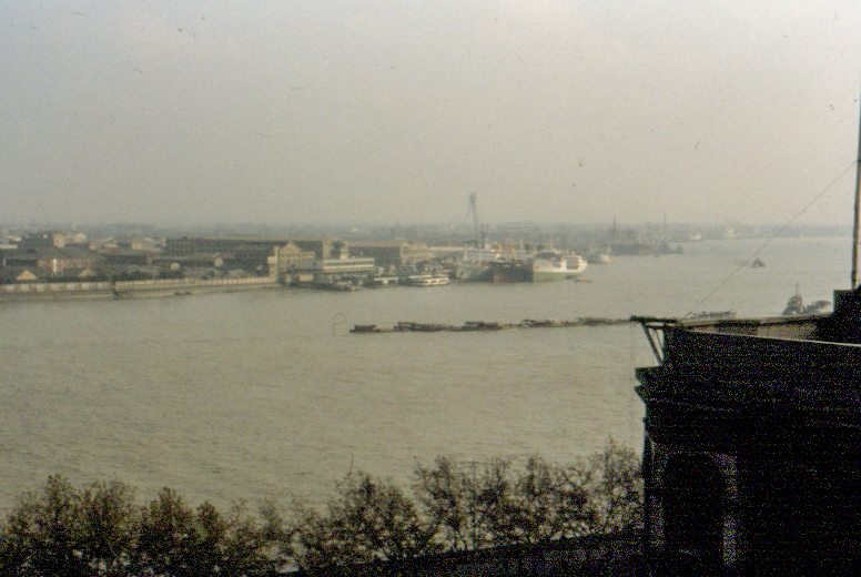 Shanghai